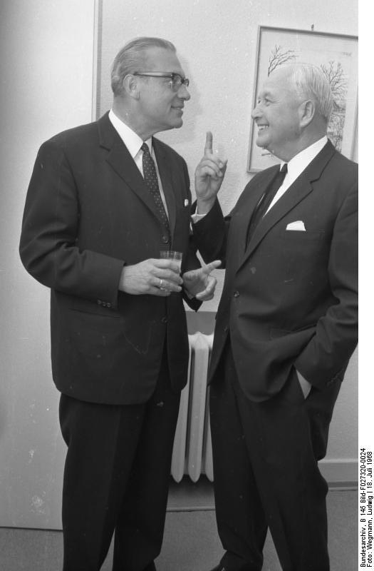 Abschiedsemfang in der Landesvertretung Saarland von Dr. Waltzinger